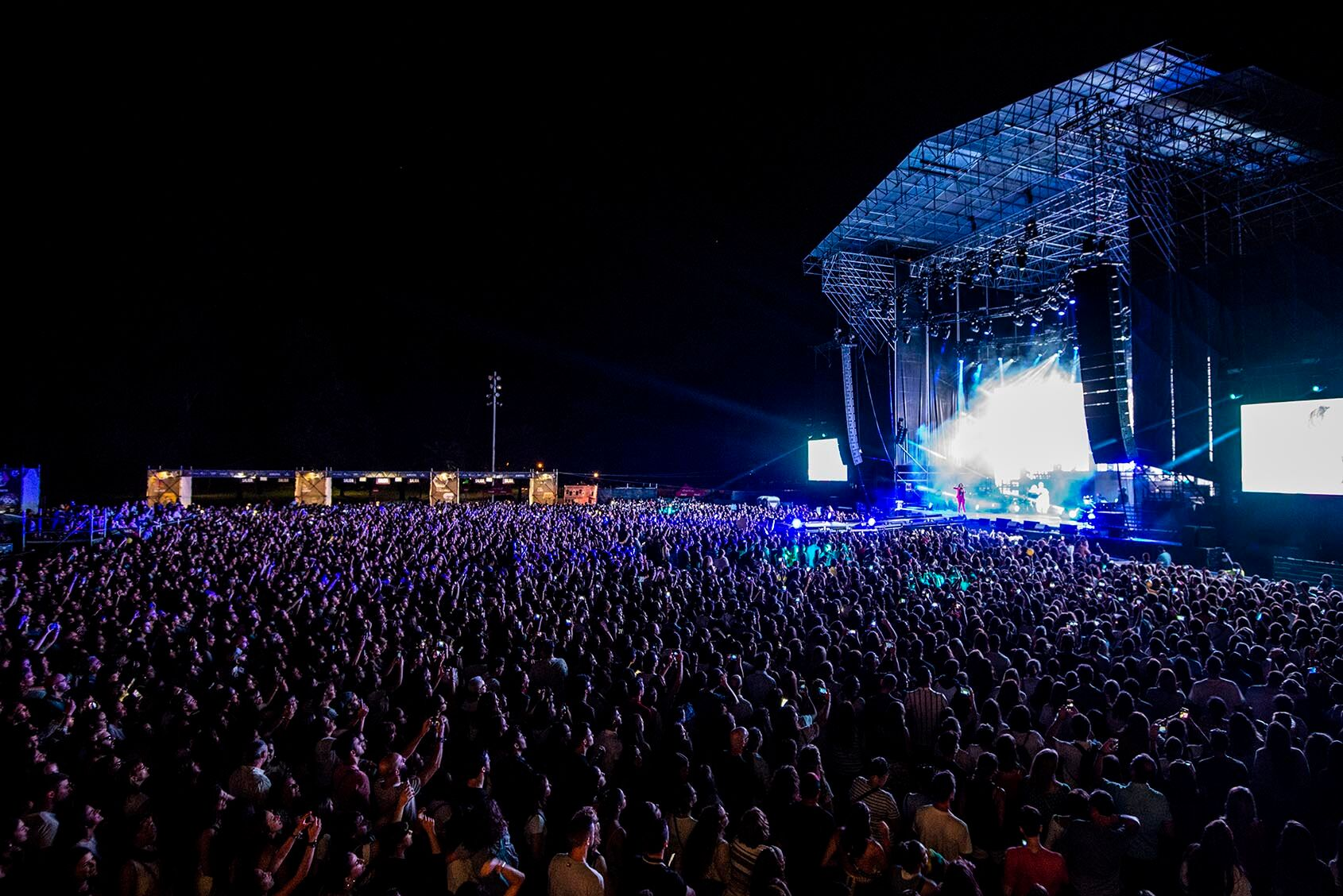 Riverland festival